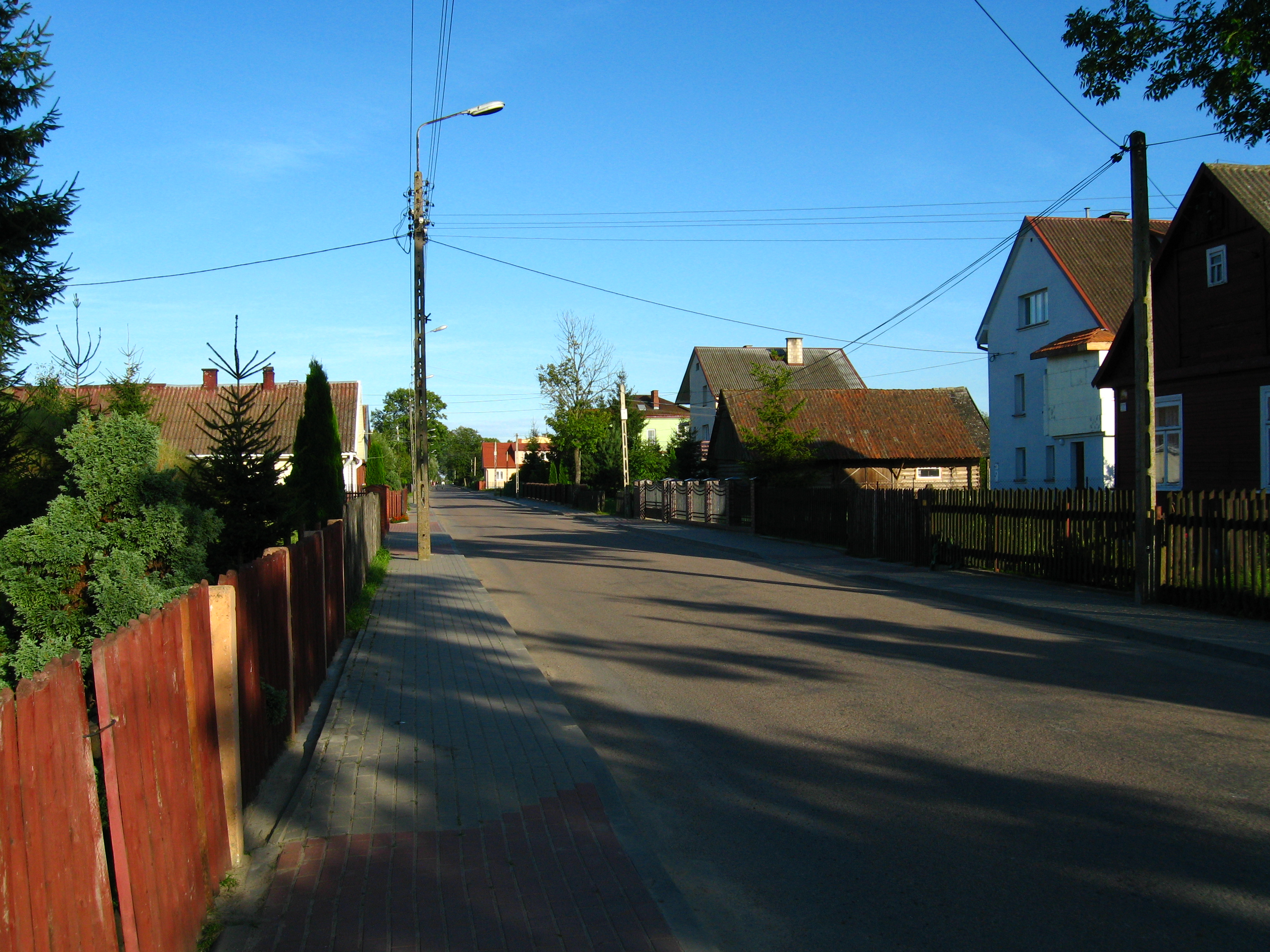 Dobrzyniówka, gmina Zabłudów